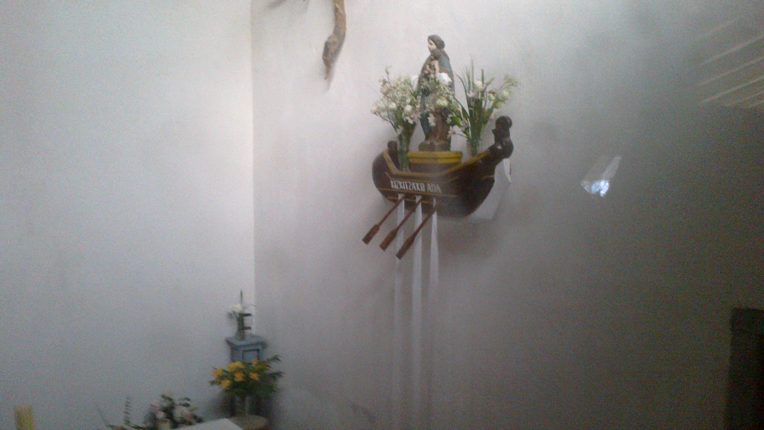 Kizkitzako Amaren irudia (Ezkio-Itsaso, Gipuzkoa)